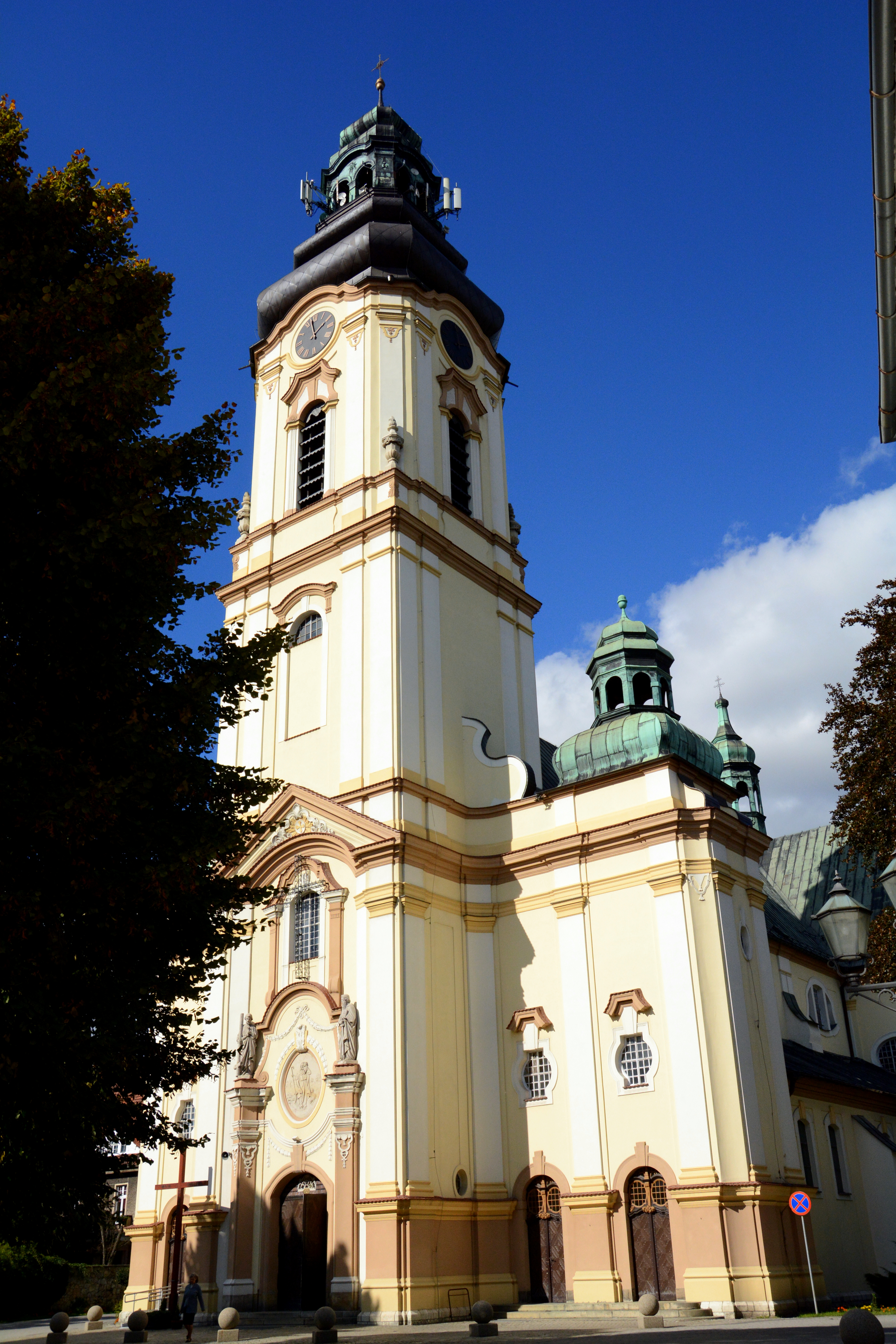 Kościół par. p.w. św. Wawrzyńca, 1904-1907